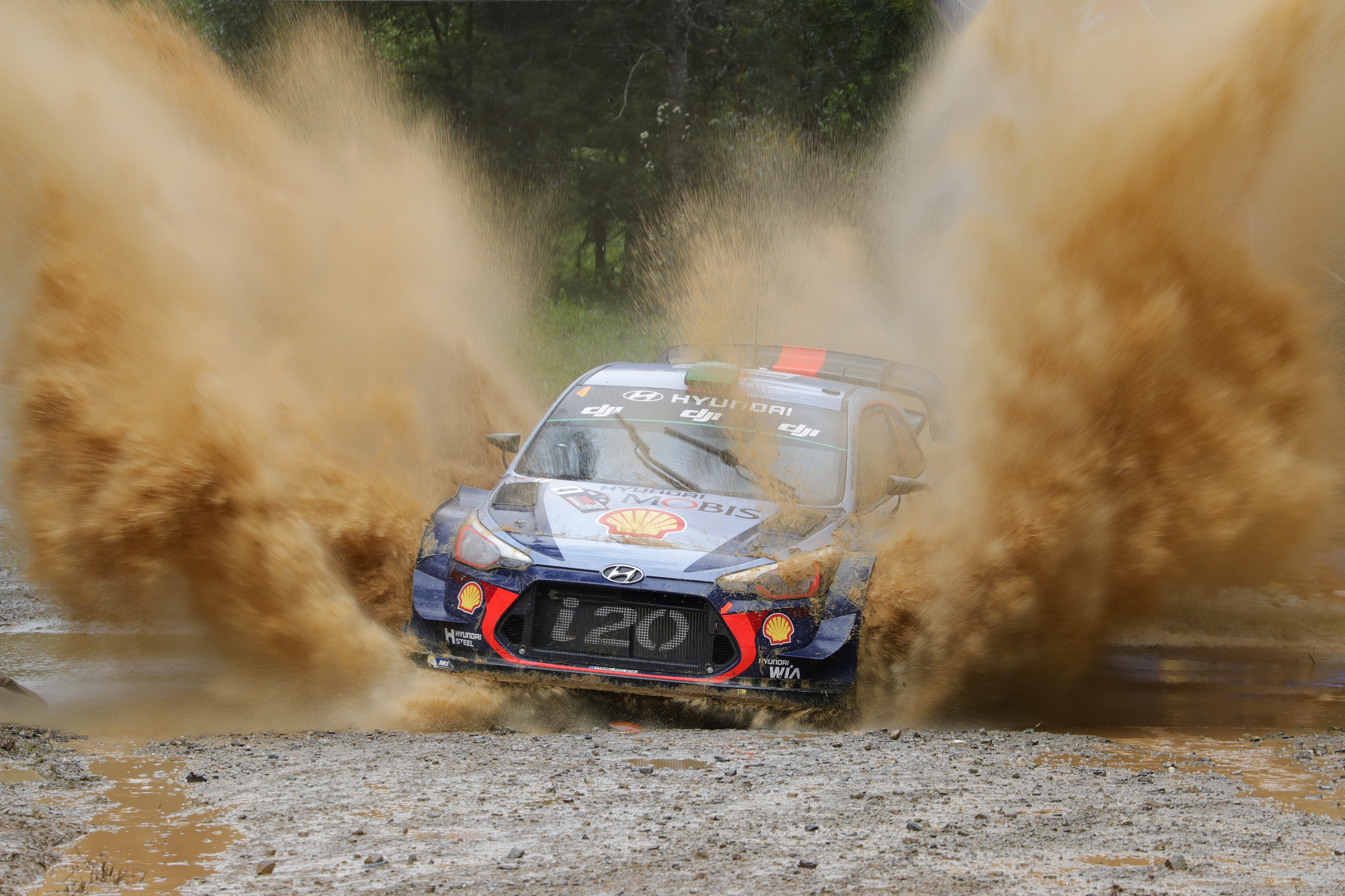 Hayden Paddon podczas Rajdu Austarlii 2017